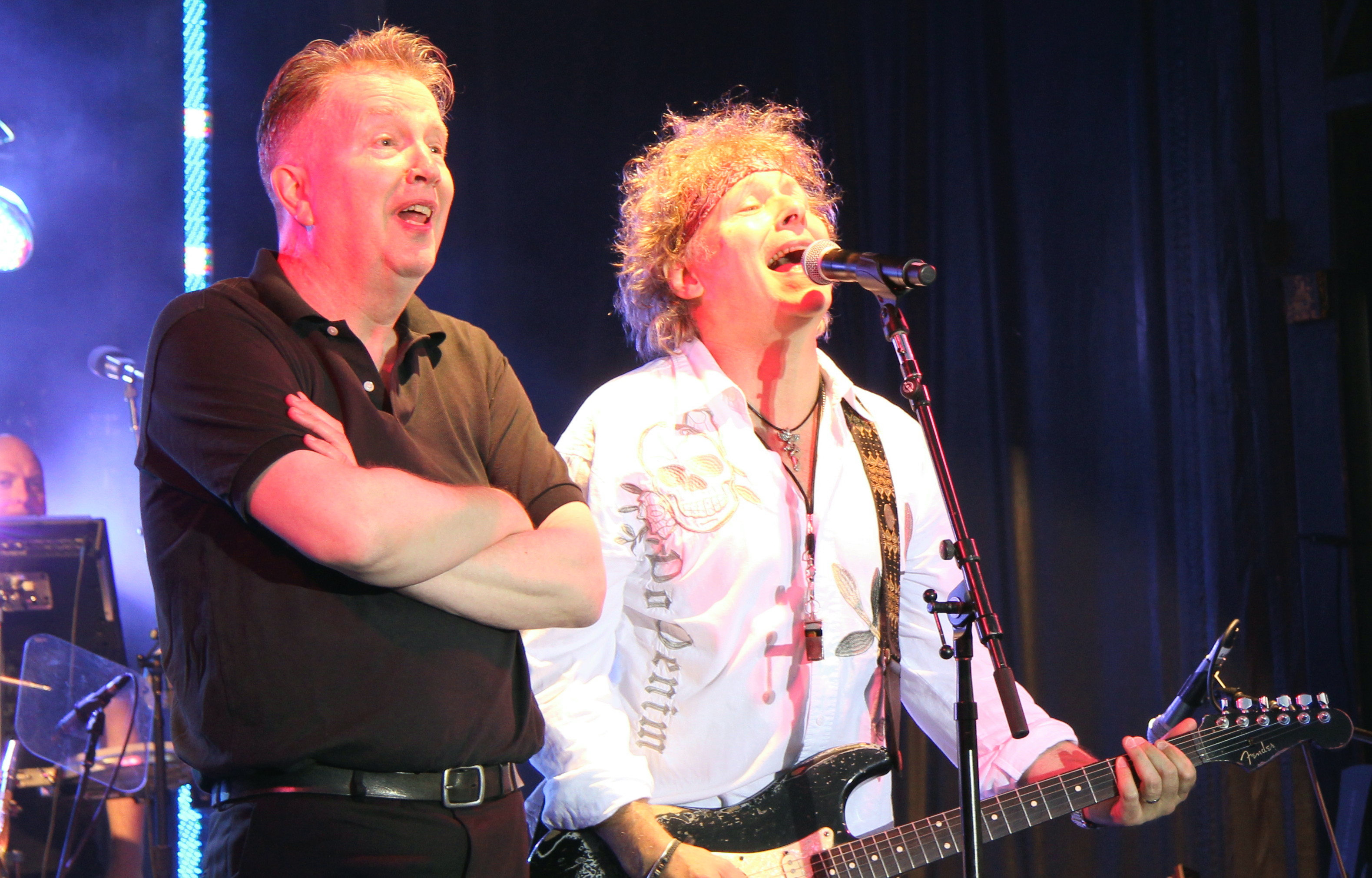 Tom Robinson_ Jamie Moses_1523